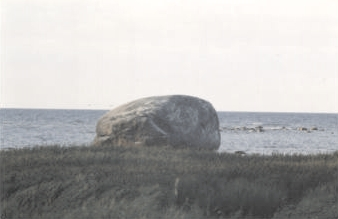 Ehalkivi.